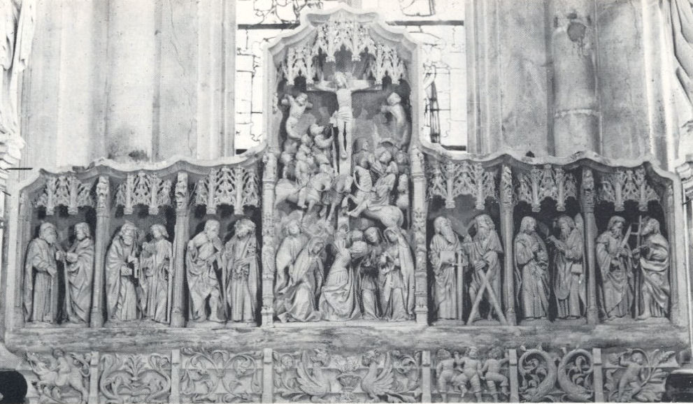 Rétable aux 12 apôtres XVI° siècle